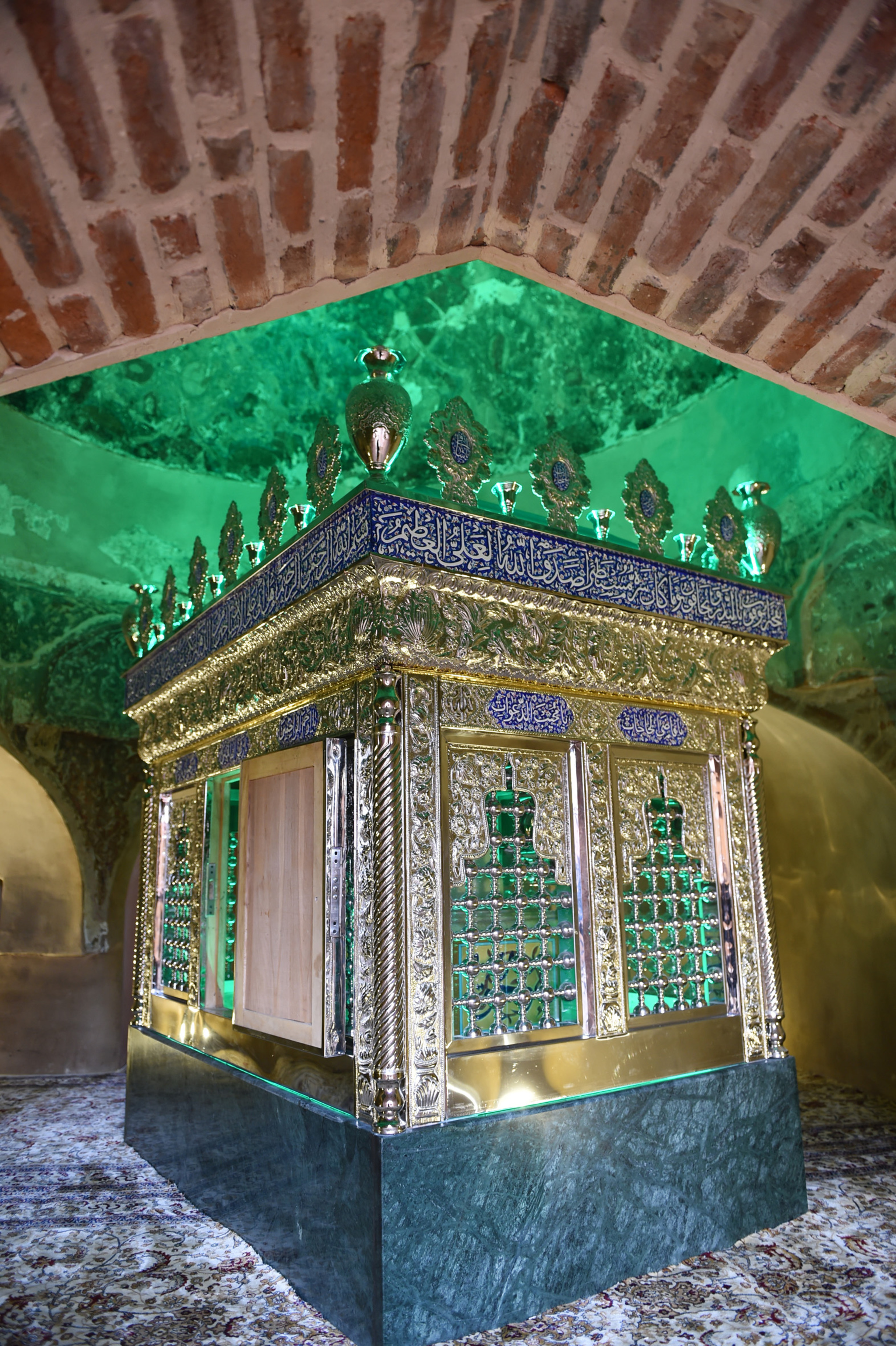 Gəncə imamzadəsi